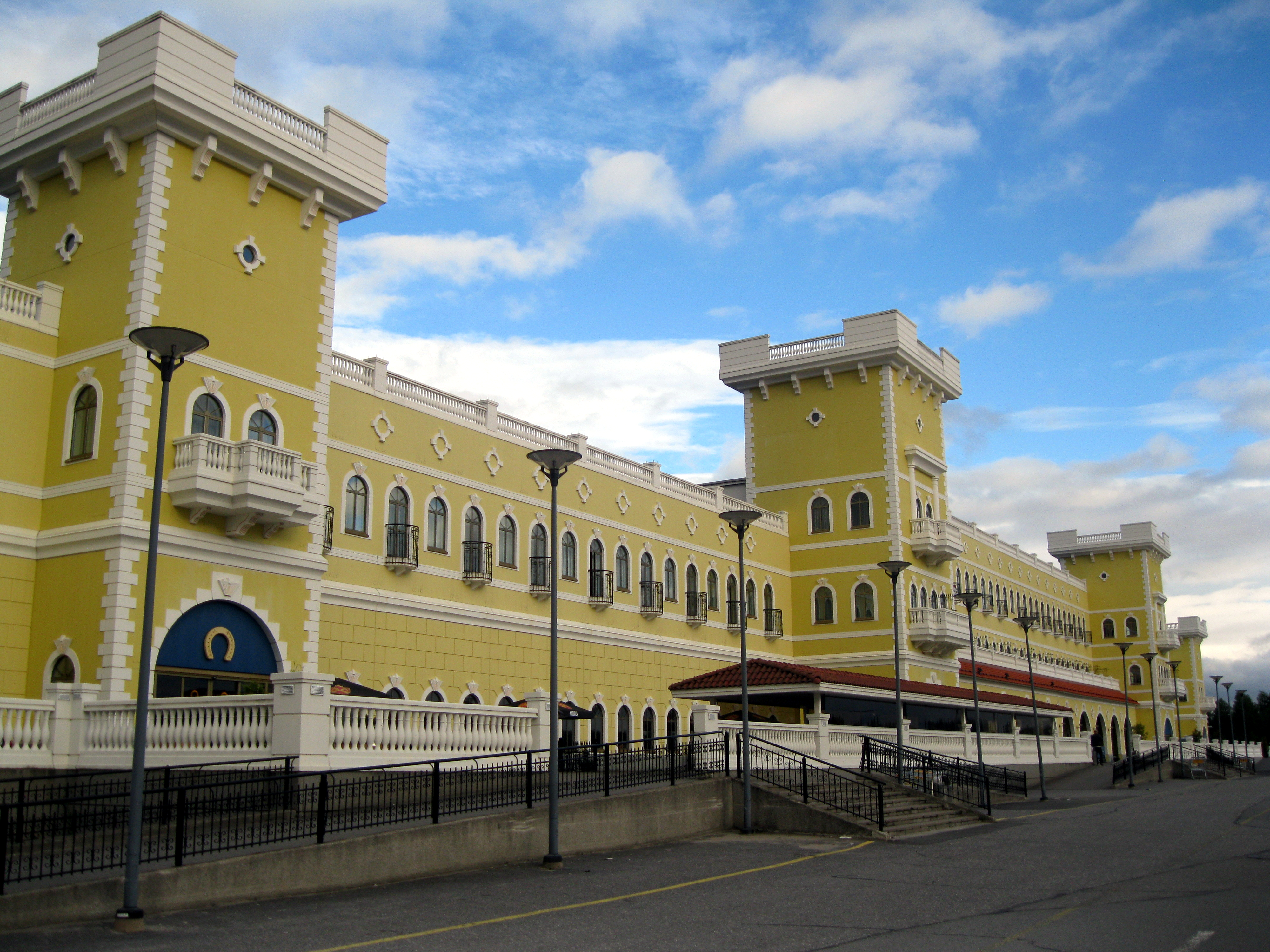 Veljekset Keskisen ruokapuoti kesäkuussa 2016.